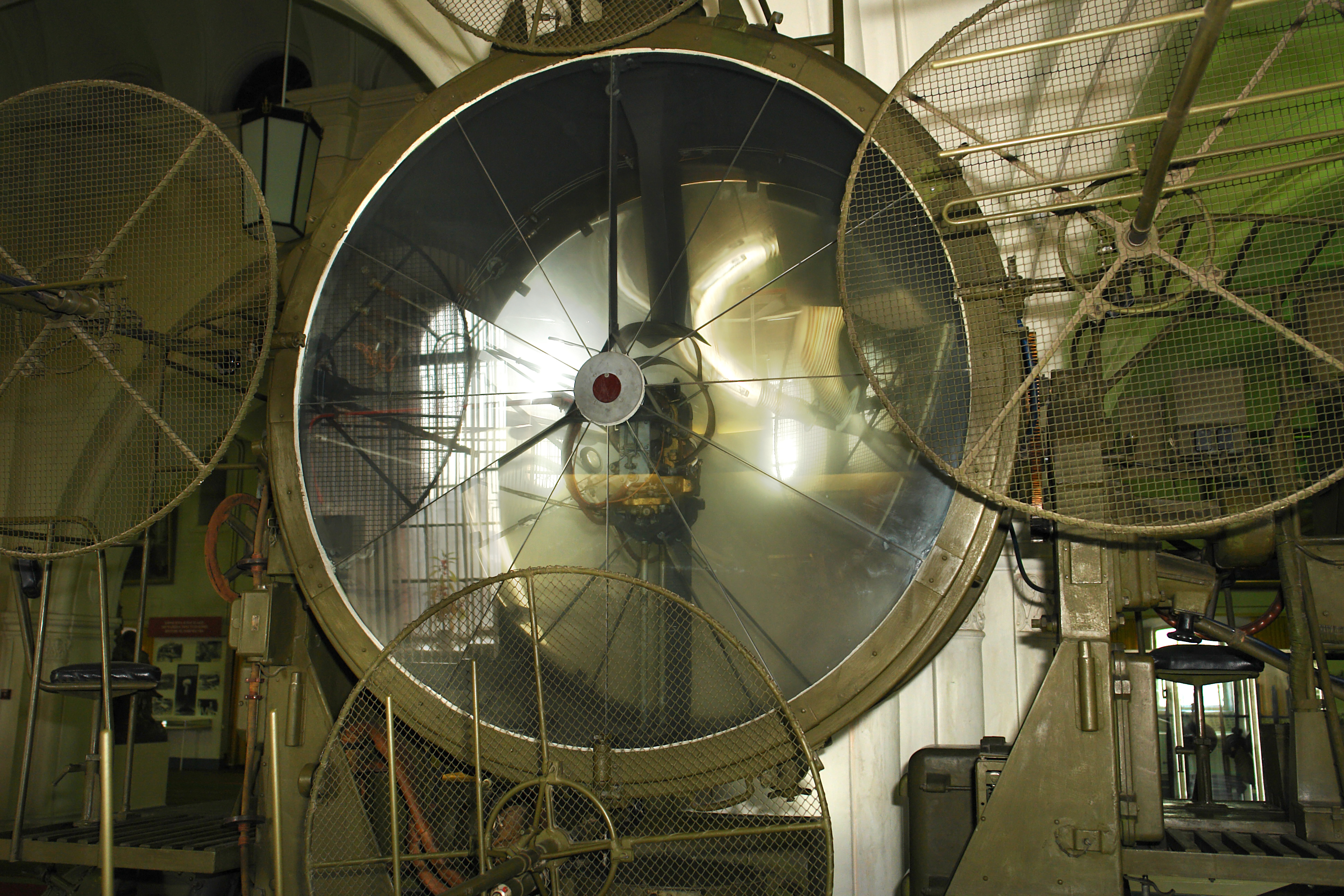 150 см ЗЕНИТНАЯ РАДИОПРОЖЕКТОРНАЯ СТАНЦИЯ РП-15-1 Предназначена для обнаружения воздушных целей и определения наклонной дальности до них, точного наведения прожектора по азимуту и углу места на обнаруженную цель, для ее освещения лучом прожектора ночью. Станция представляет собой зенитный прожектор ЗП-15-2, на котором смонтированы радиолокатор и система дистанционного управления с выносным постом управления. В состав станции входит также агрегат питания на автомашине ЗИС-151, одновременно являющейся тягачом. Дальность обнаружения воздушных целей — не менее 28—30 км. Дальность пеленга — не менее 25 км. Минимальная дальность обнаружения и пеленга воздушных целей — 1 км. Масса радиопрожектора (с повозкой ЗУ-13п) — около 5070 кг. Военно-исторический музей артиллерии, инженерных войск и войск связи, Санкт-Петербруг.